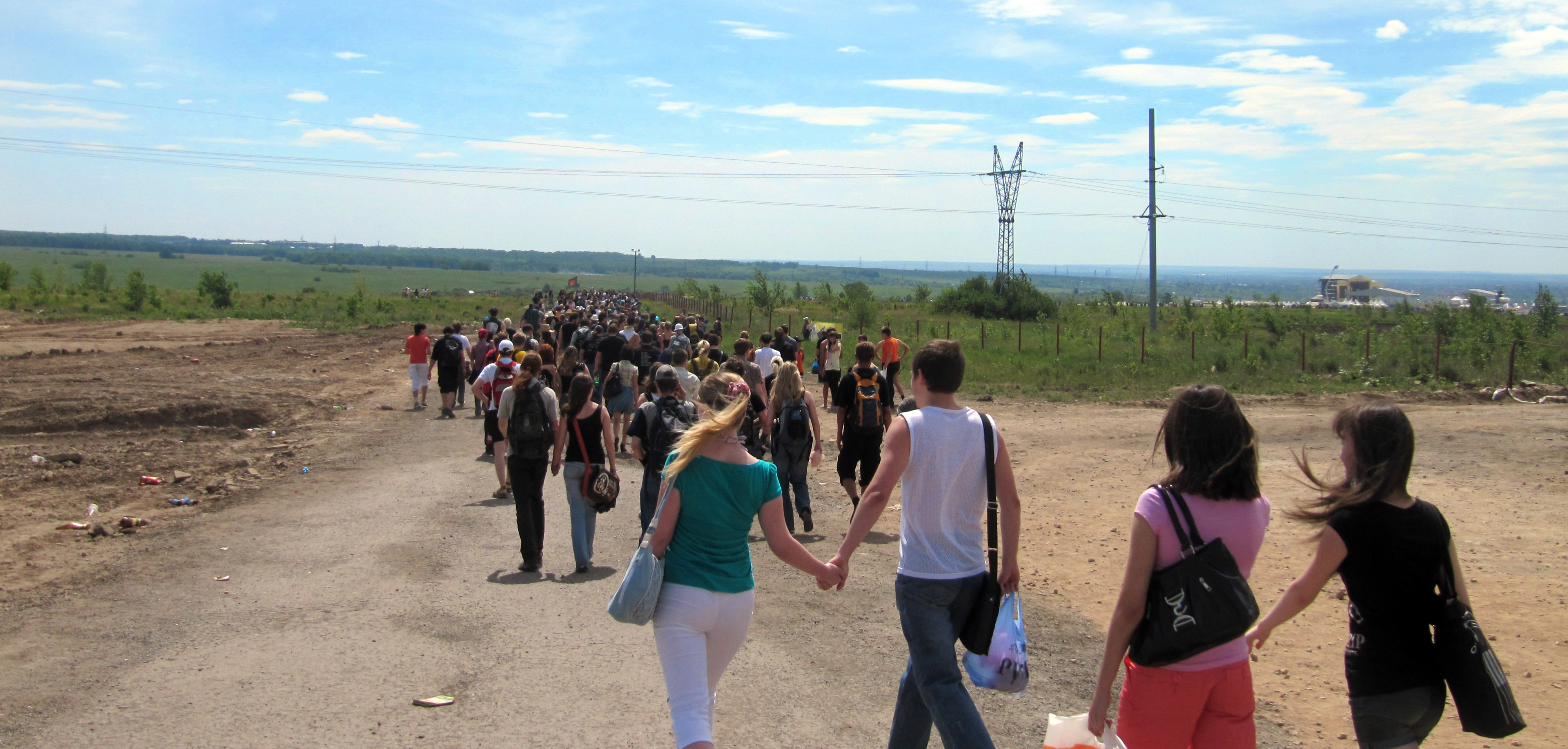 Очередь на фестиваль Рок над Волгой 2010